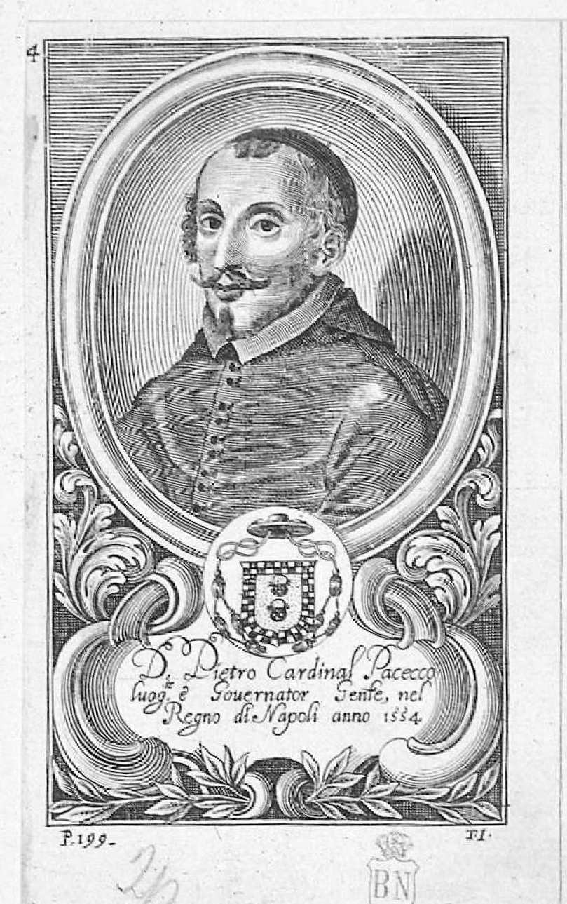 Pedro Pacheco. Grabado calcográfico anónimo recogido en Teatro eroico, e politico de'governi de'Vicere del Regno de Napoli, de Domenico Antonio Parrino, Nápoles, 1692-1695.